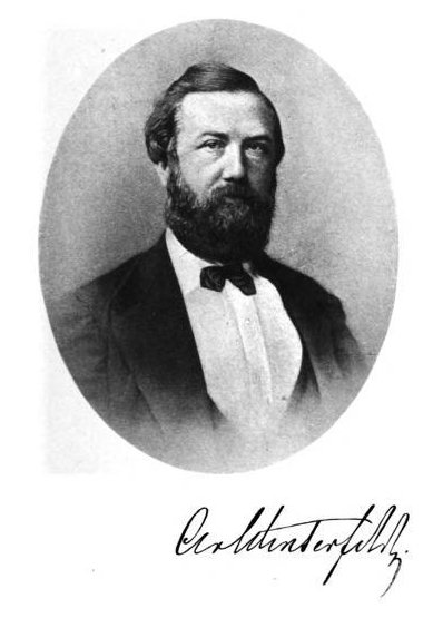 Adolf von Winterfeld in: Robert Burns in Other Tongues. Von William Jacks. Glaskow. S. 47. ?1896?